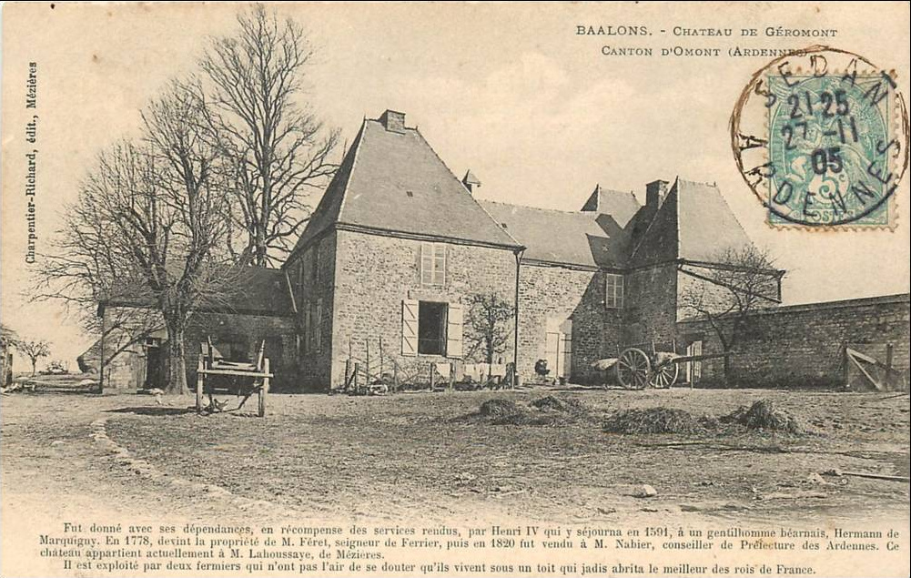 Baâlons (Ardennes, France) ; la ferme de Géraumont, bâtisse du XVIe siècle.